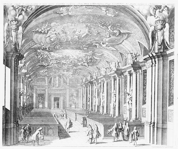 Slottskyrkan i slottet Tre Kronor i Stockholm, etsning på papper av Johannes van den Aveelen. Nationalmuseums inventarienummer NMG 467/1875.